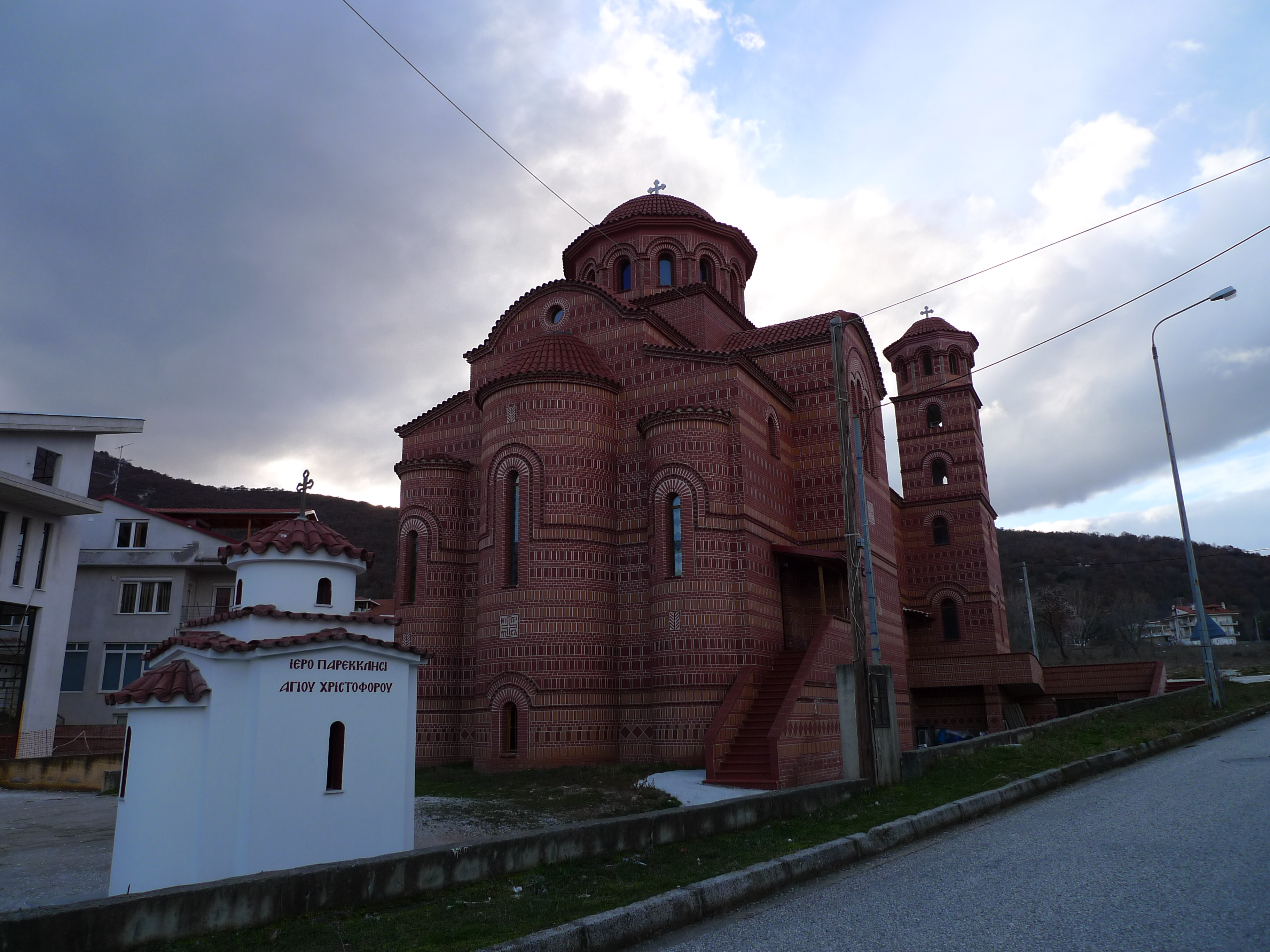 Църквата "Свети Никанор" в Нов чифлик (Хлои), Костурско, Гърция.